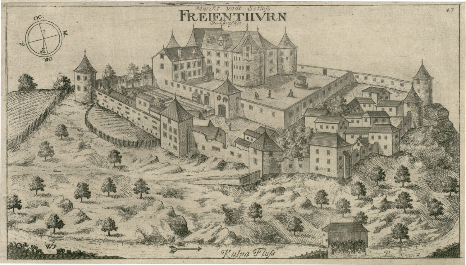 Grad in mesto Pobrežje (Freienthurn)